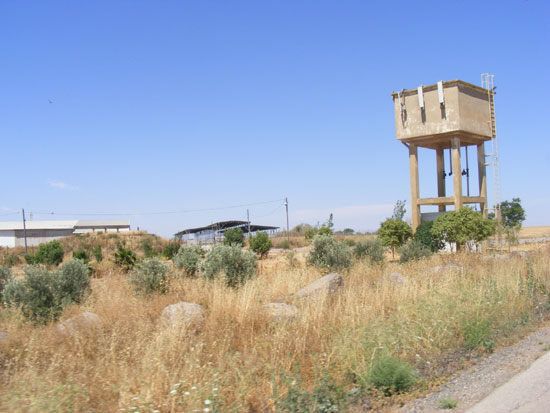 خزان الماء في قرية كفر حارب المحتلة